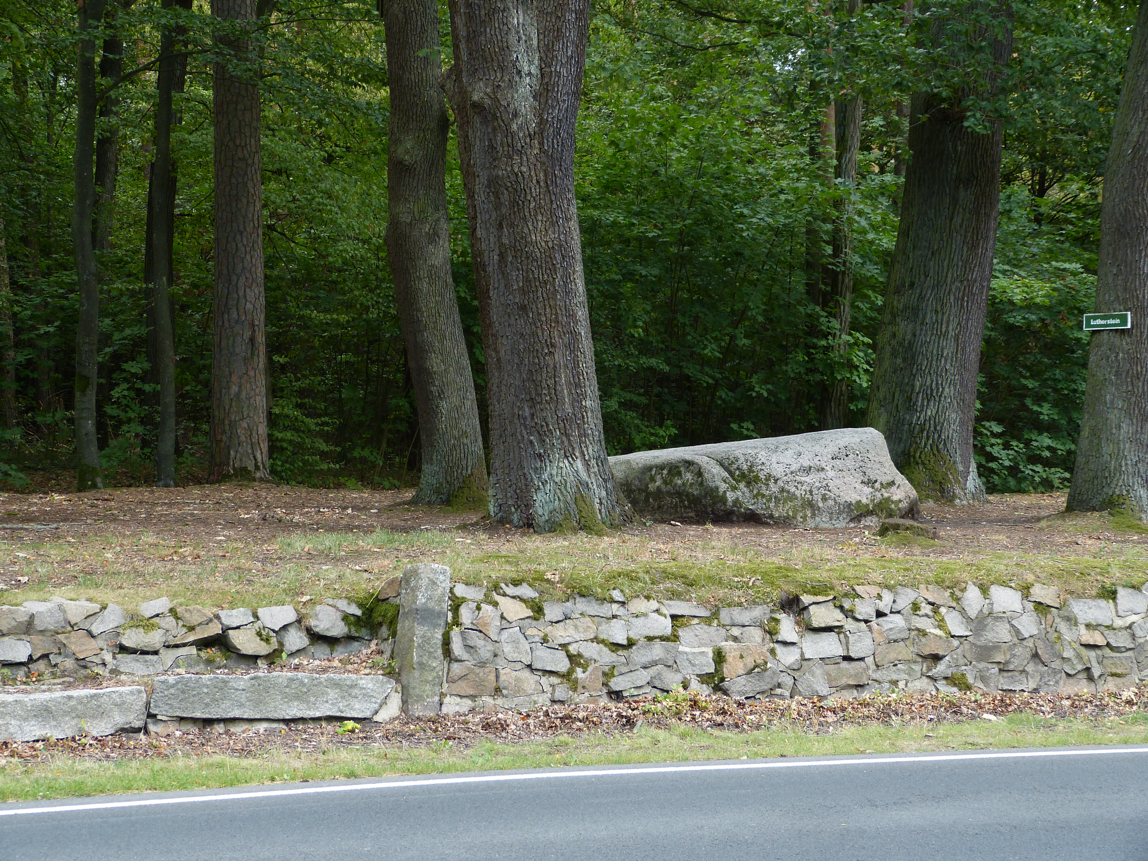 Lutherstein in der Dübener Heide an der B2